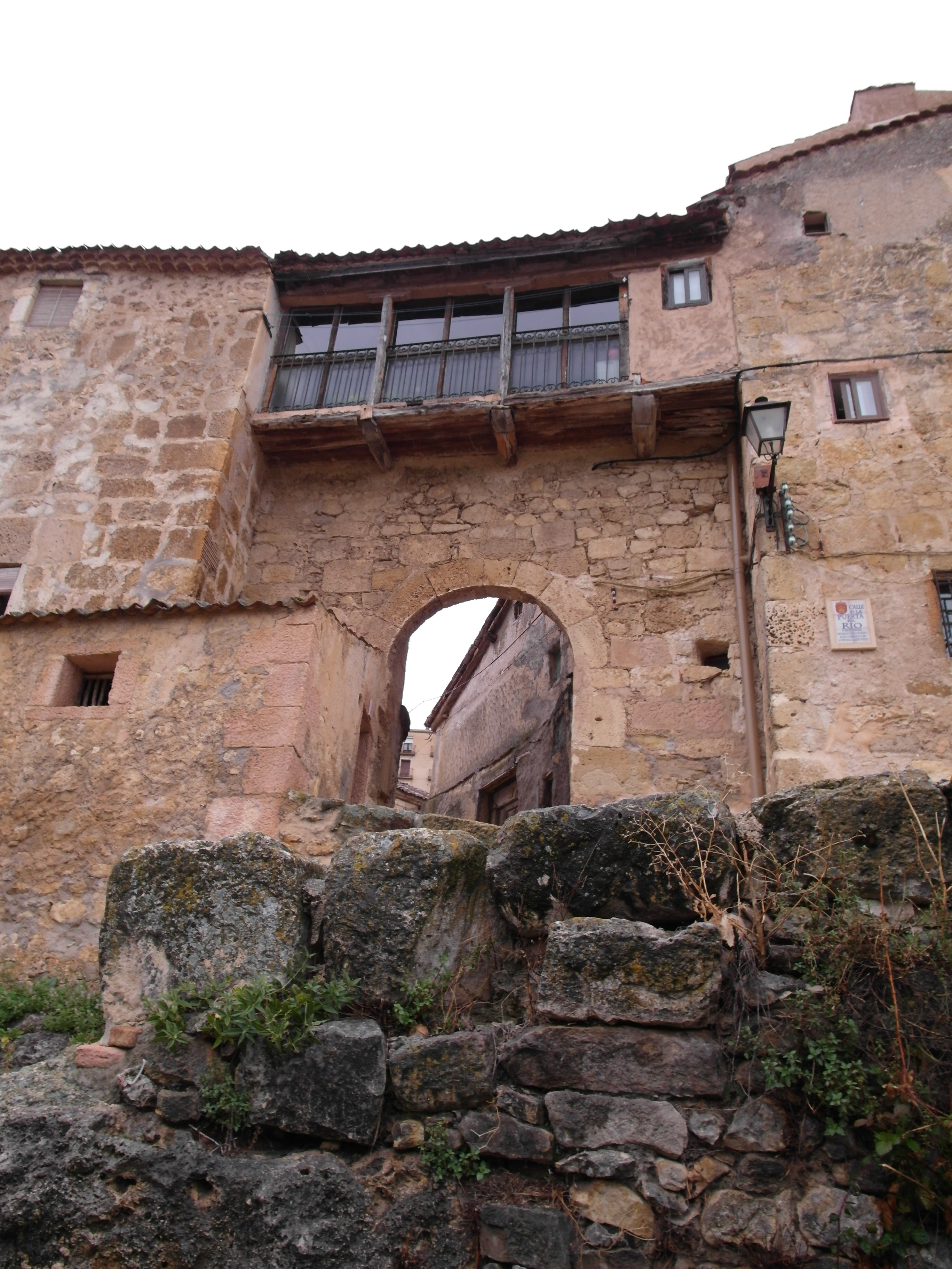 Sepúlveda, Segovia.